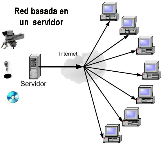 Imagen generada con Microsoft Visio y alguna imagen libre insertada de (micrófono, cd y cámara))